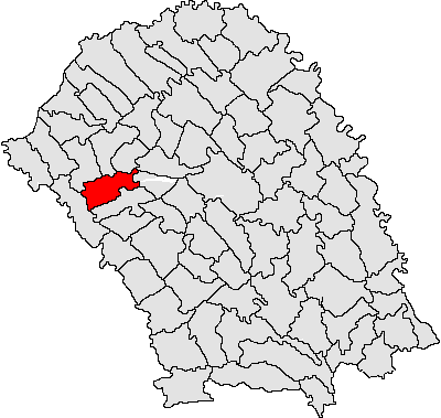 Categorie:Hărţi ale judeţului Botoşani